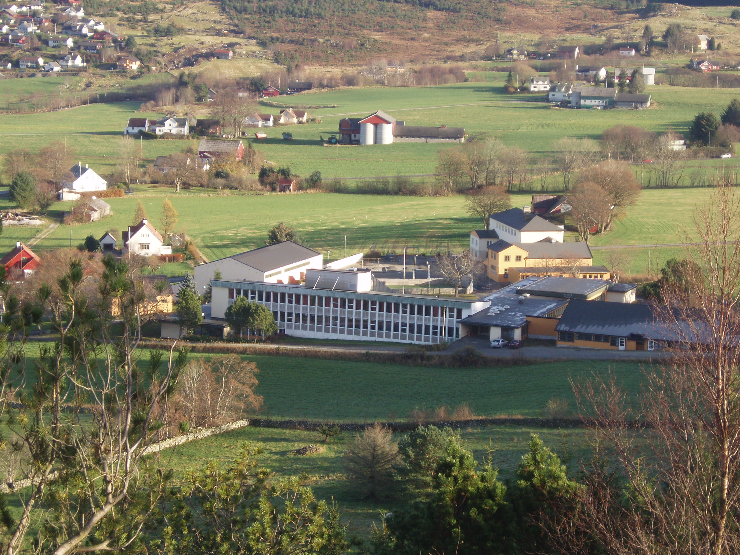 Rimbareid Barne- og Ungdomsskule